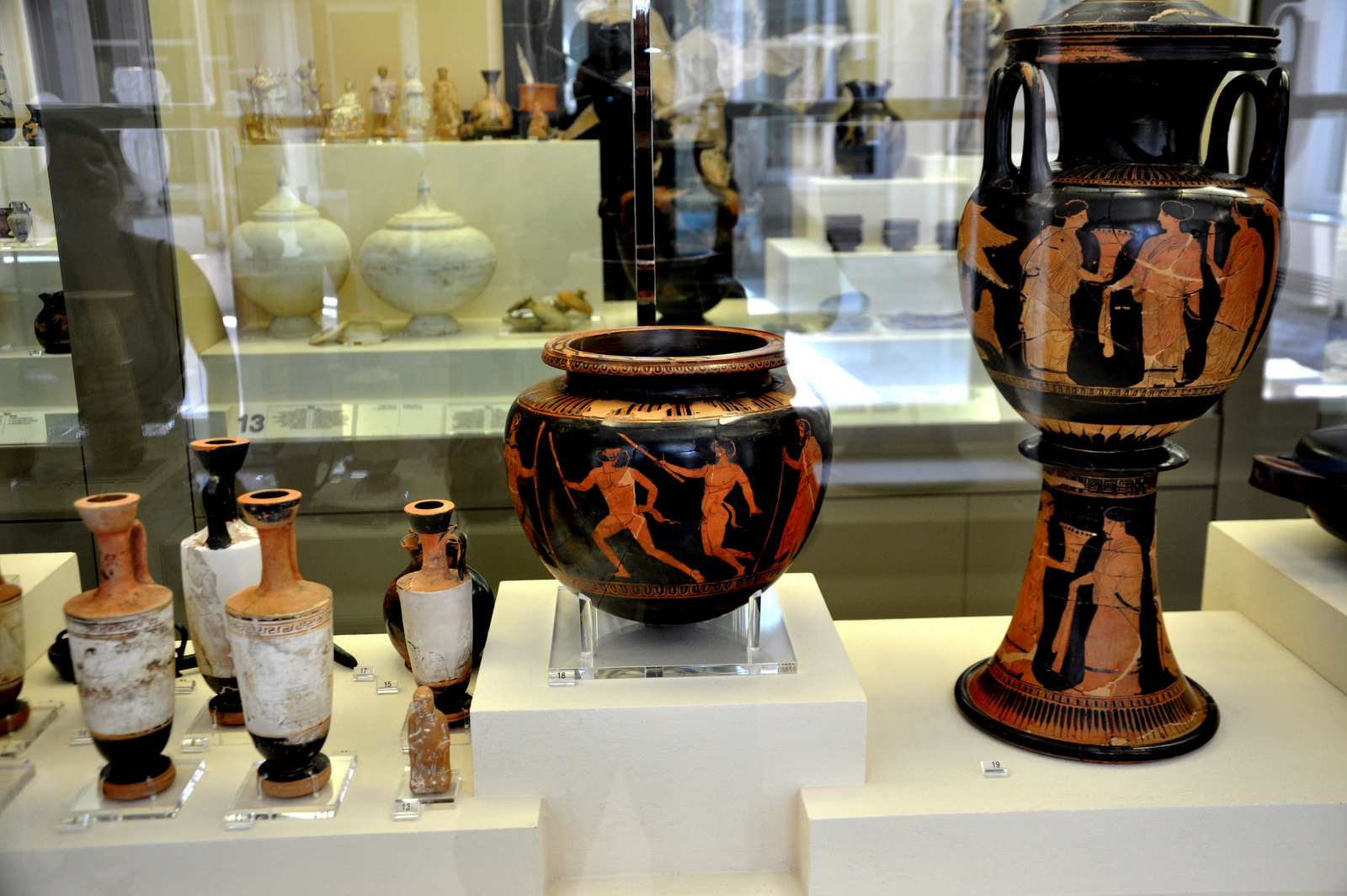 Fragment ekspozycji waz w Muzeum Keramejkosu, w Atenach